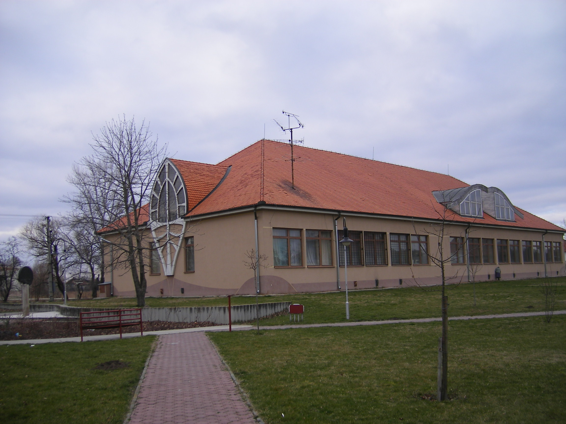 Csallóközaranyos - AZ új kultúrház a falu központjában